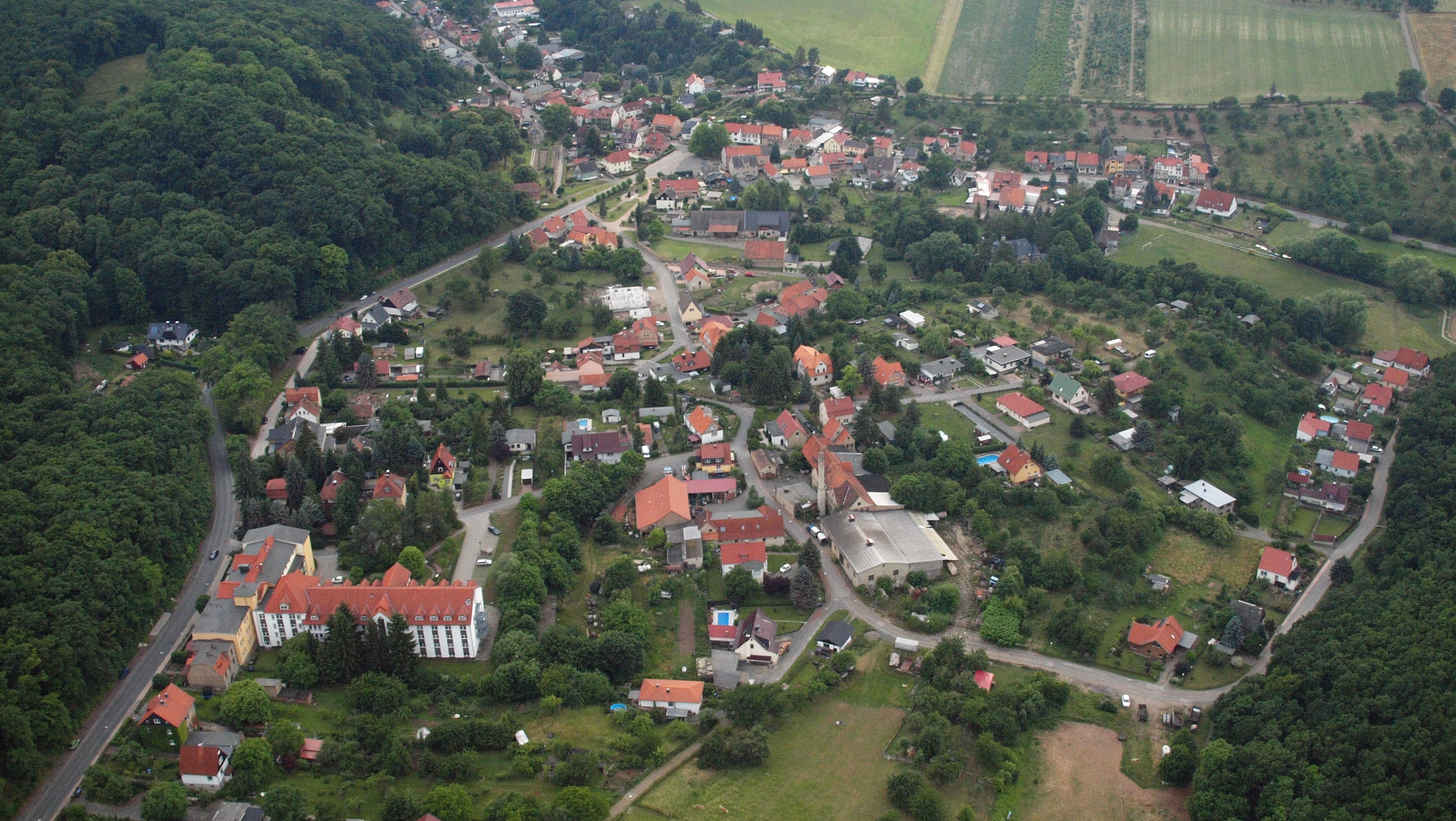 Stecklenberg, Luftaufnahme (2015)